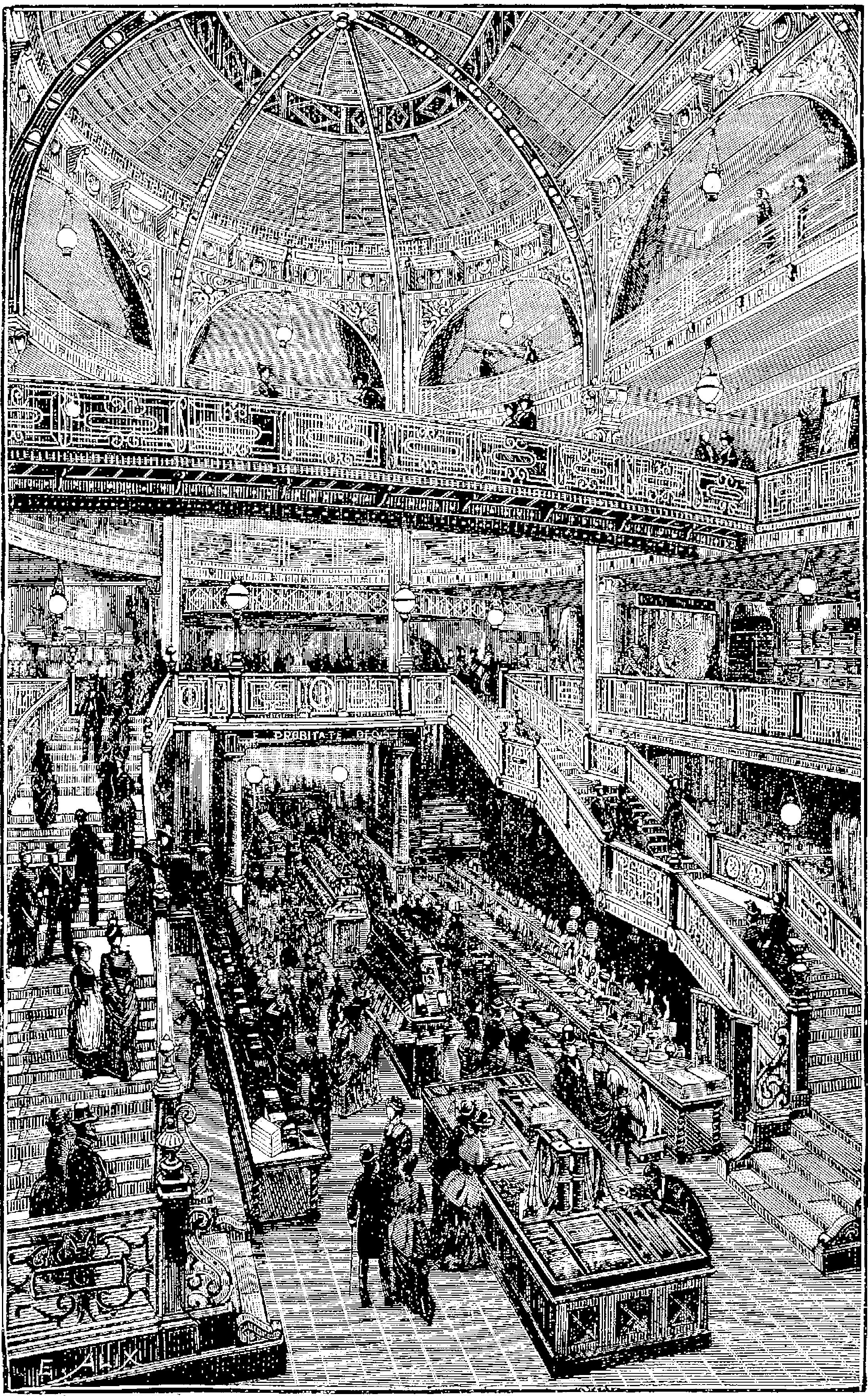 Éclairage électrique de la nef des Grands Magasins du Printemps, à Paris